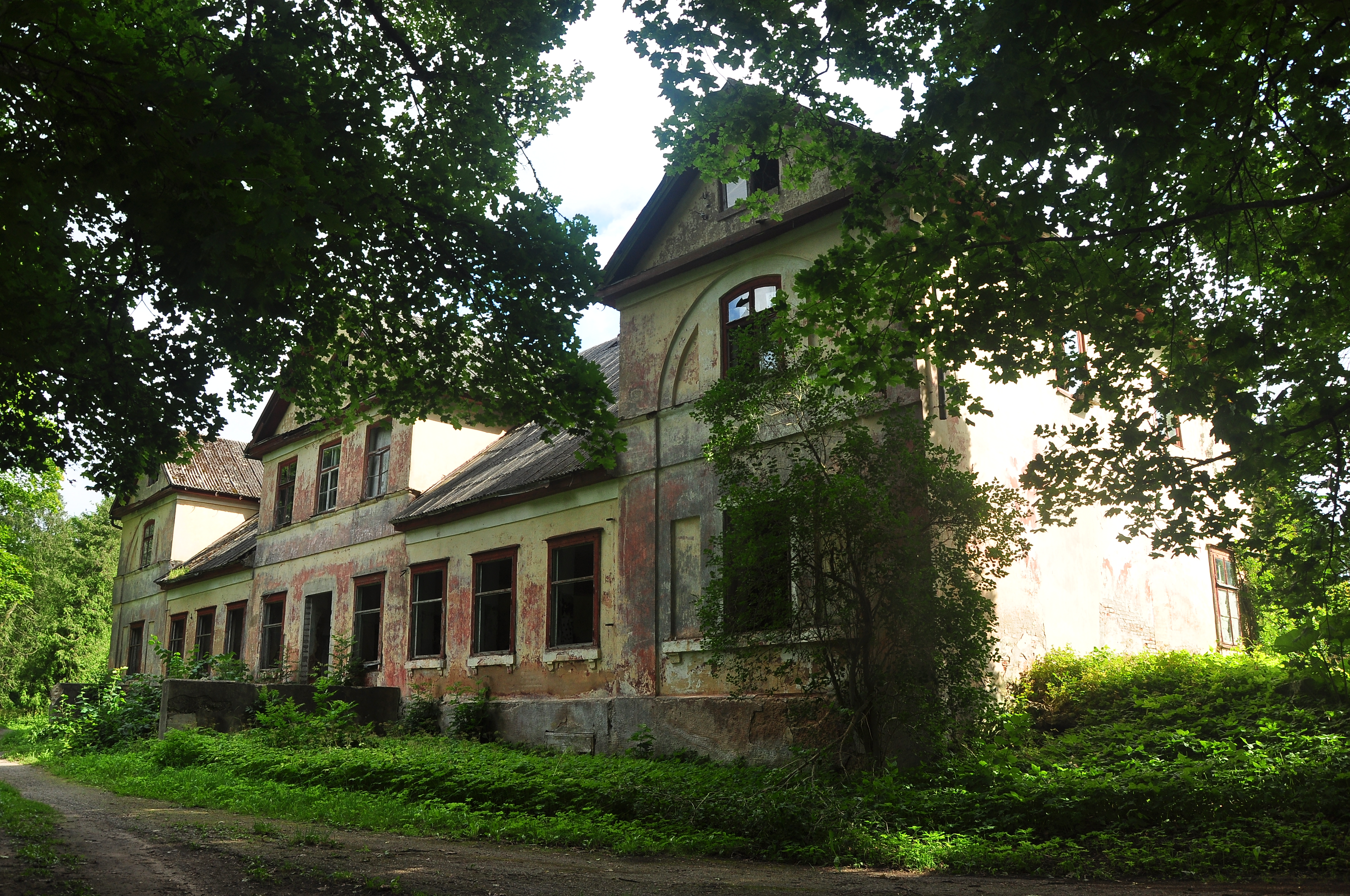 Lubezeres muiža